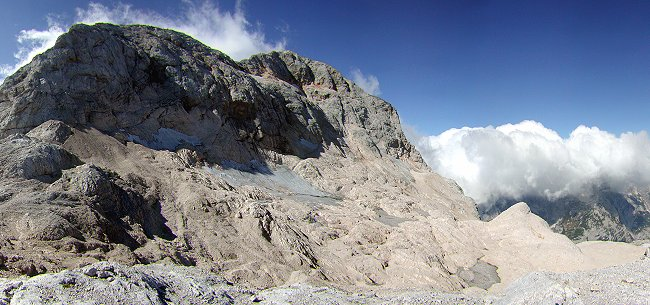 Ostanki Triglavskega ledenika - September 2002